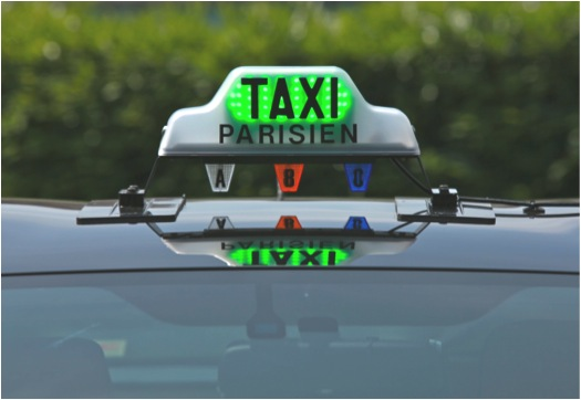 Nouveau lumineux de taxi vert et rouge